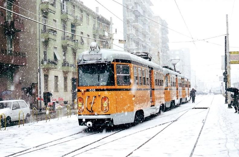 Bloccato interurbano 535+503+536 in attesa di partire per Limbiate ripreso al capolinea di Affori il 28 febbraio 2001 sotto una pesante nevicata. Foto personale